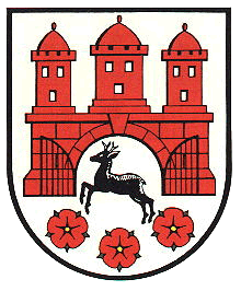 Das Wappen kombinert die Burg und das Reh aus dem Wappen der ehemaligen Stadt Rehburg mit den drei Rosen aus dem Wappen der ehemaligen Gemeinde Loccum. Flaggenbeschreibung „In der Flagge werden untereinander und in dem Banner nebeneinander angeordnete Farbhälften rot und weiß mit dem in der optischen Mitte aufgesetzten Wappenschild gezeigt.“